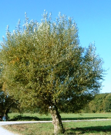 Struwwelpeter, Werk von F. K. Waechter, Standort:Schwanheimer Wiesen in Frankfurt am Main